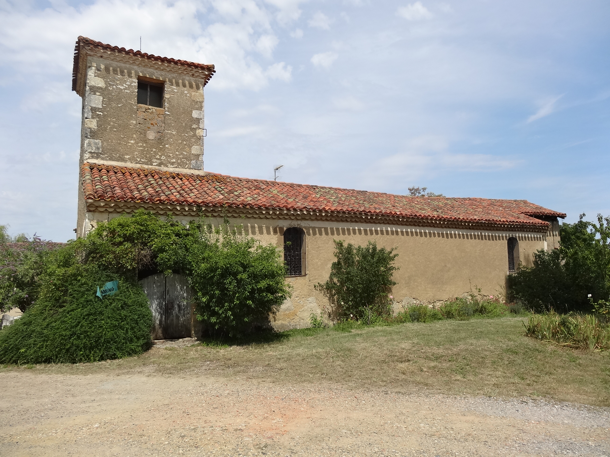 Église du hameau circulaire de Mombert.